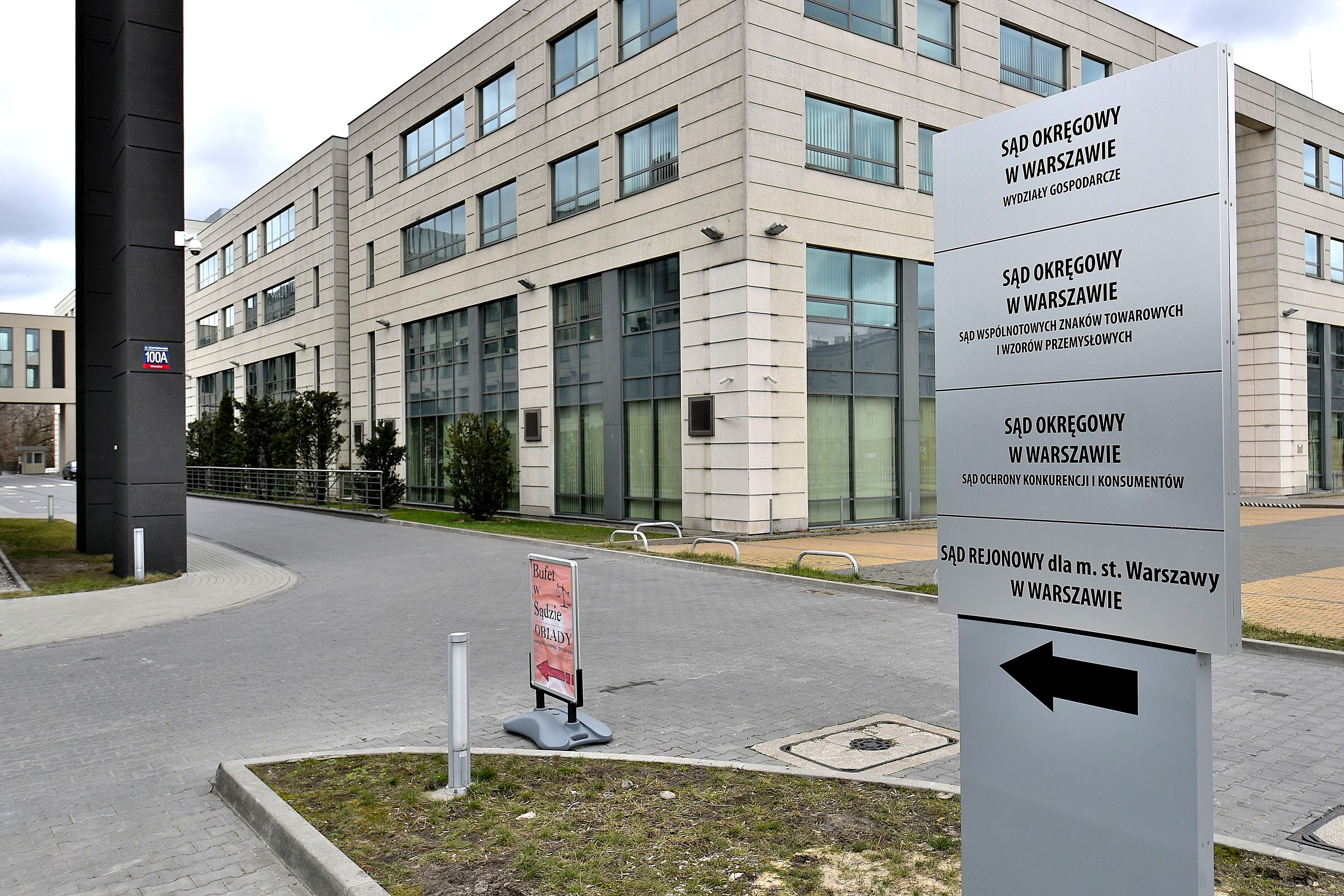 Sąd Okręgowy oraz Sąd Rejonowy dla m.st. Warszawy - Krajowy Rejestr Sądowy przy ul. Czerniakowskiej 100